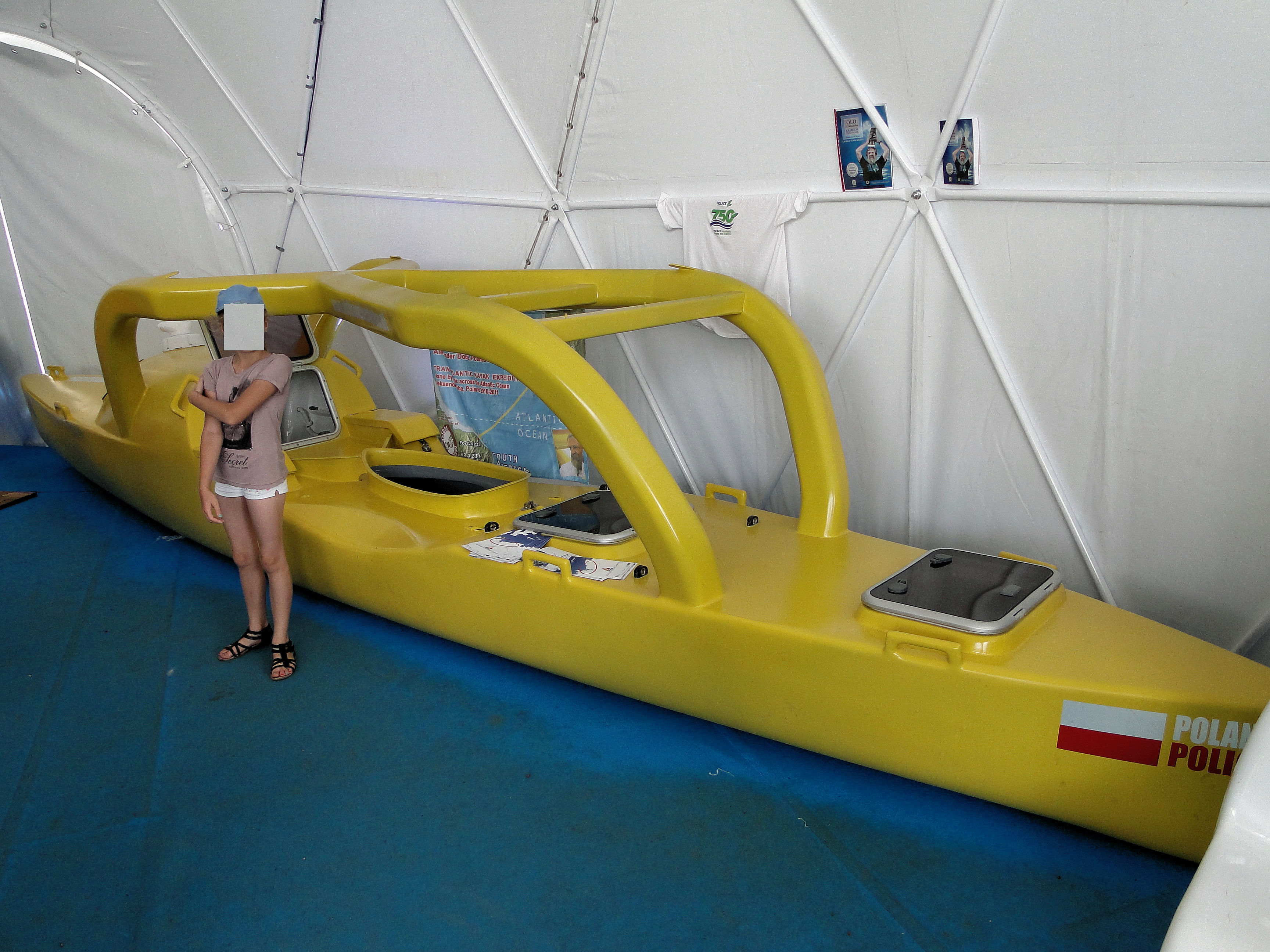 Kajak, na którym Aleksander Doba pokonał Atlantyk (2010-2011 r.)